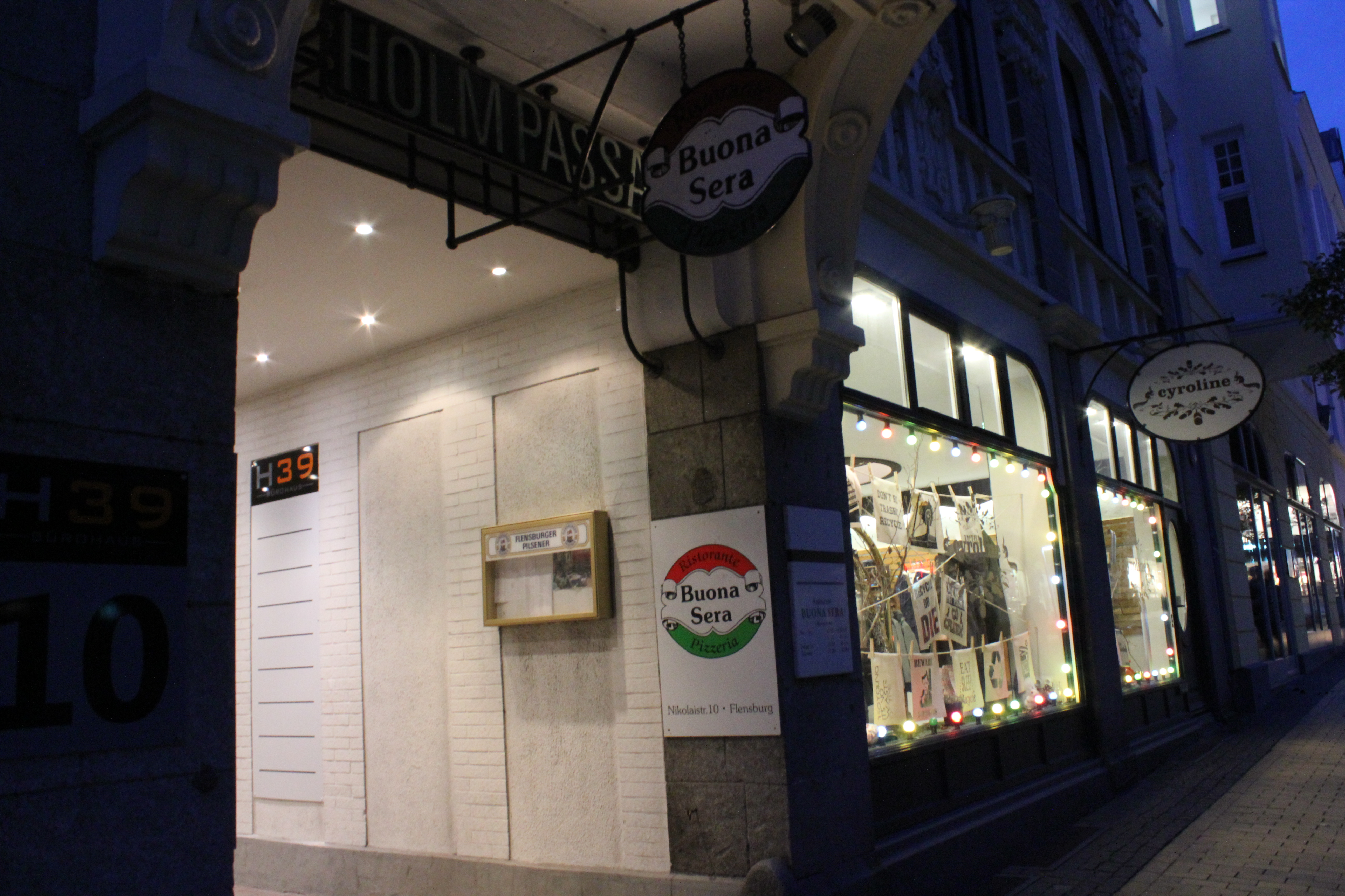 Nebeneingang zur Holmpassage über das Buona Sera bei Nacht mt ehemaligen Standort des Kinos Kosmorama; es befand sich seit 1906 in der Nikolaistraße 10 rechts unten